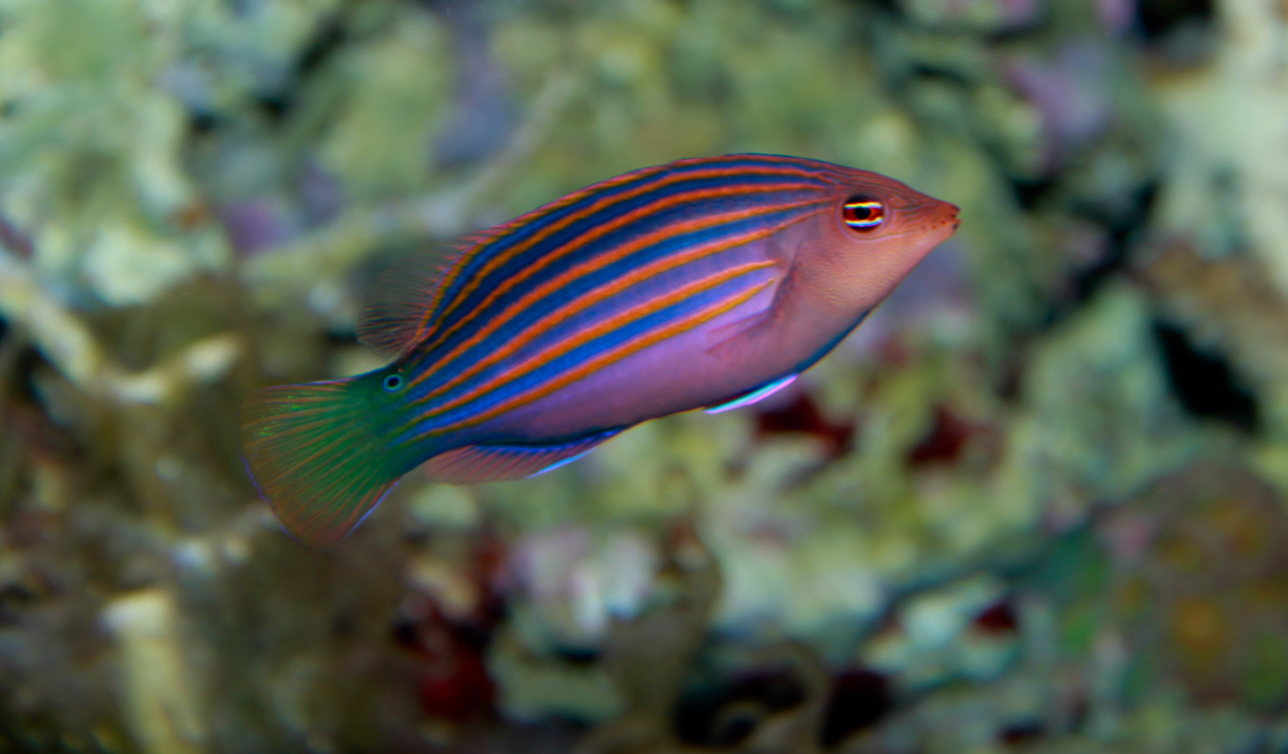 Six Line Wrasse - Pseudocheilinus hexataenia